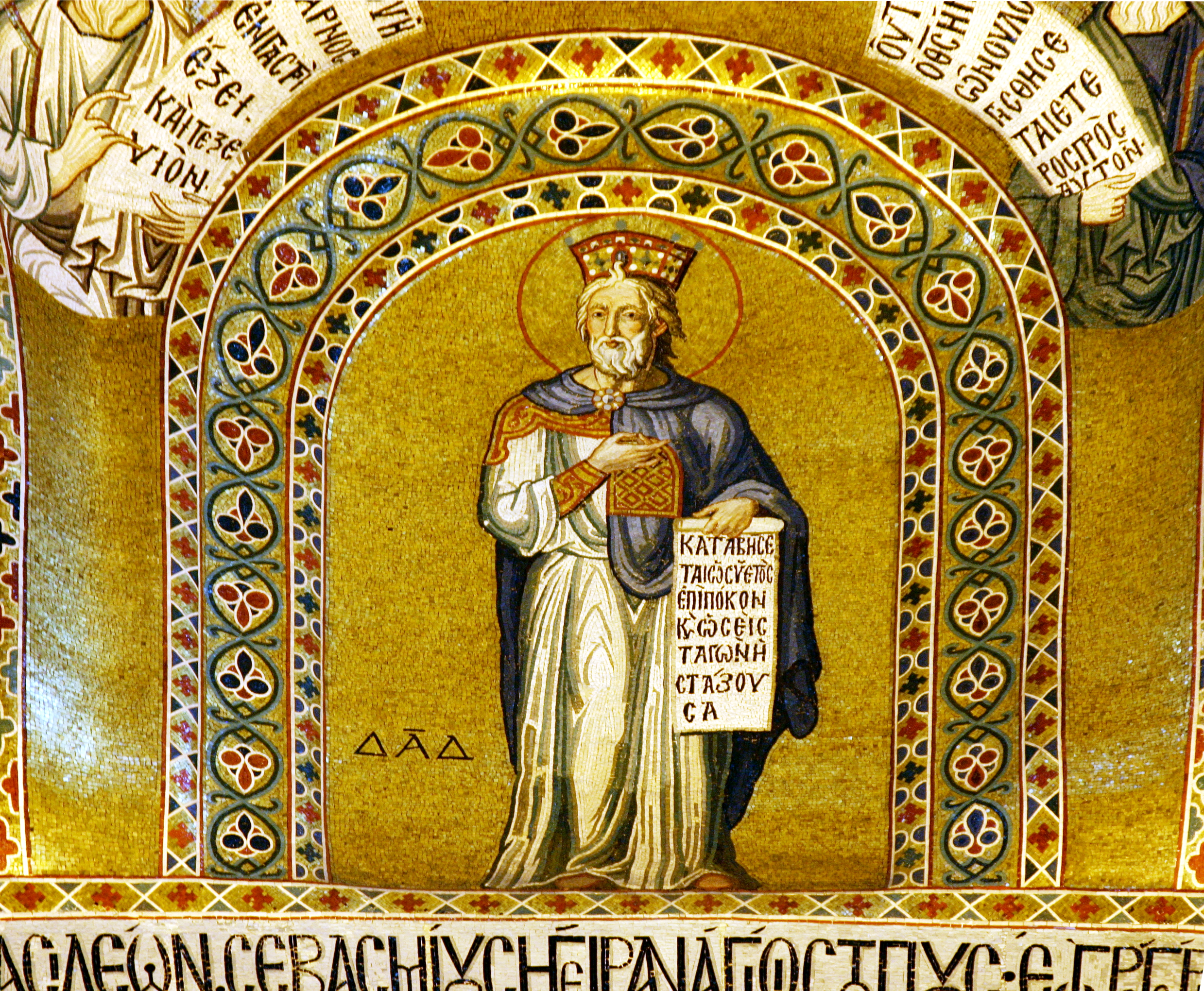 Capela Palatina